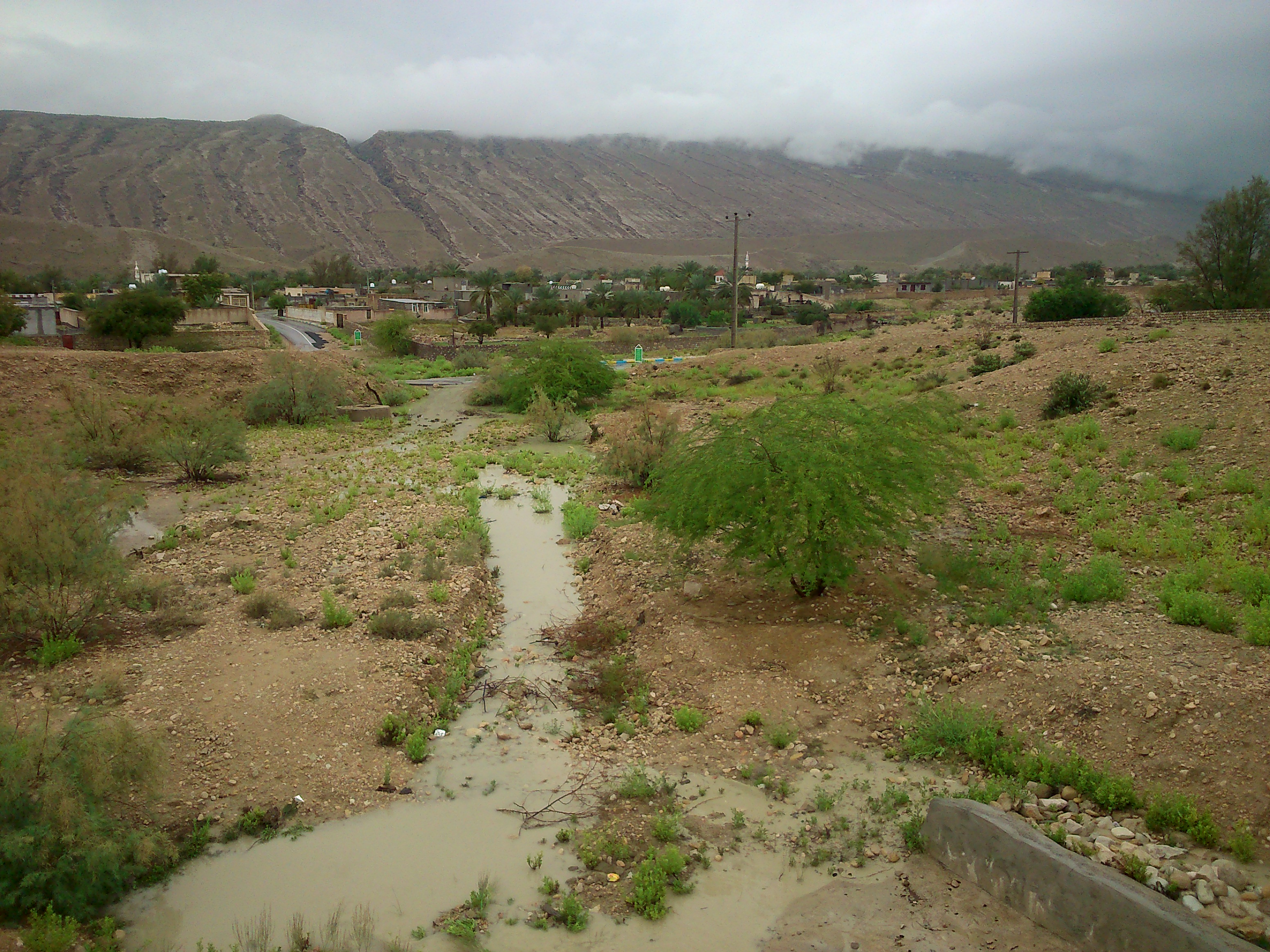 این تصور روستای گوین در فصل بهار است.